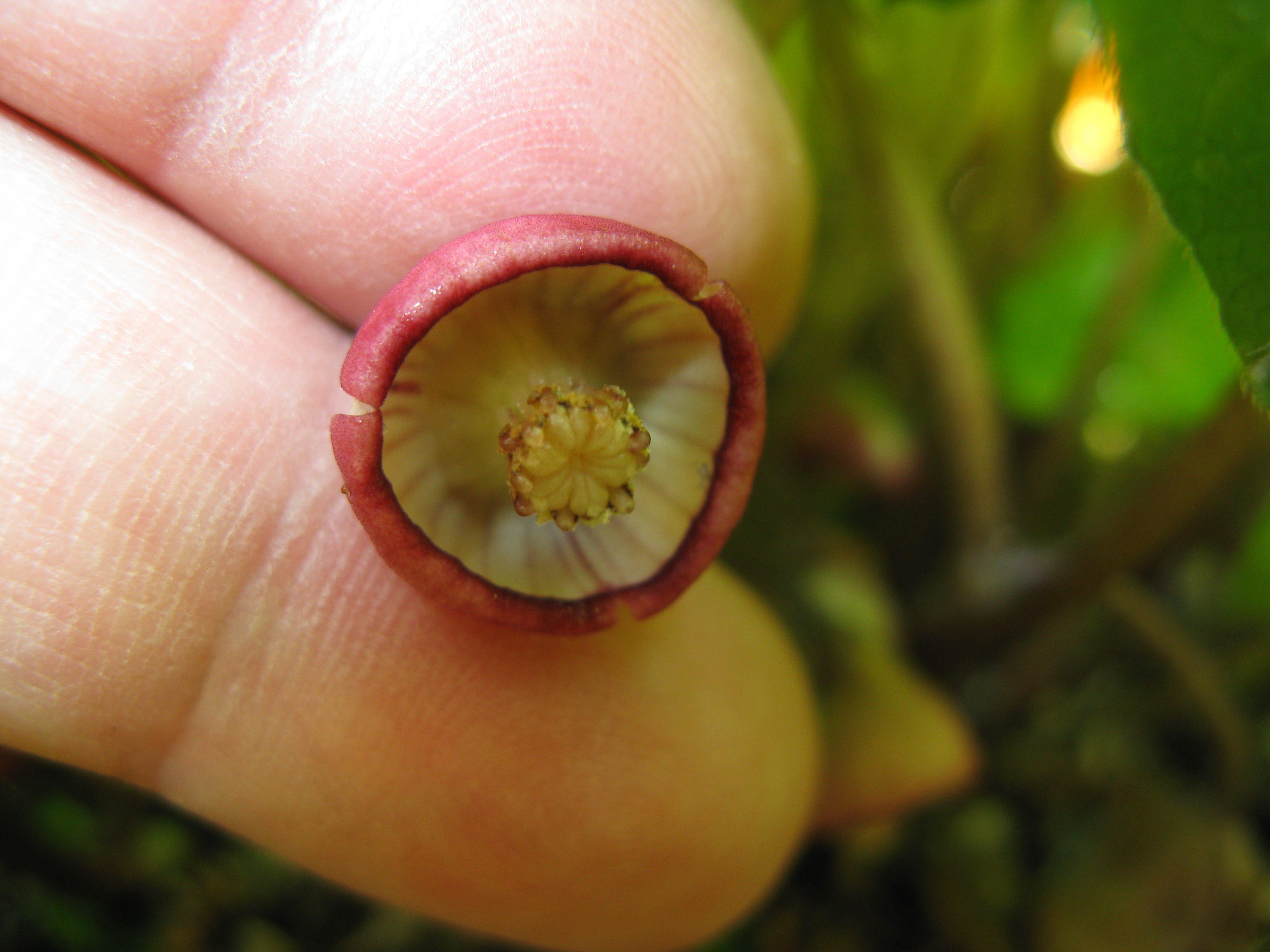 Asarum caulescens